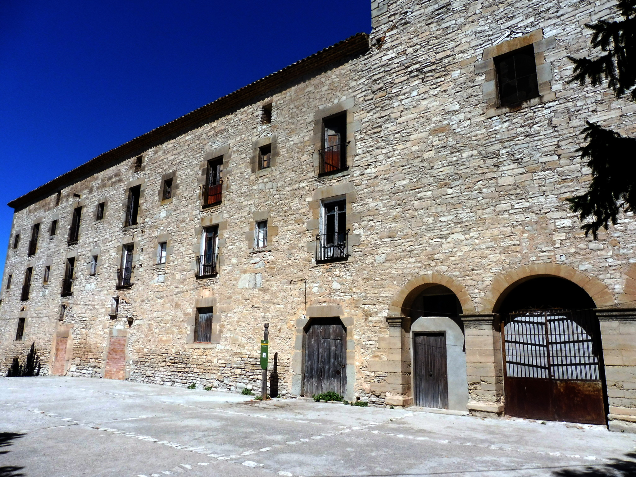 Antic Convent Jesuïta (Sant Guim de Freixenet)